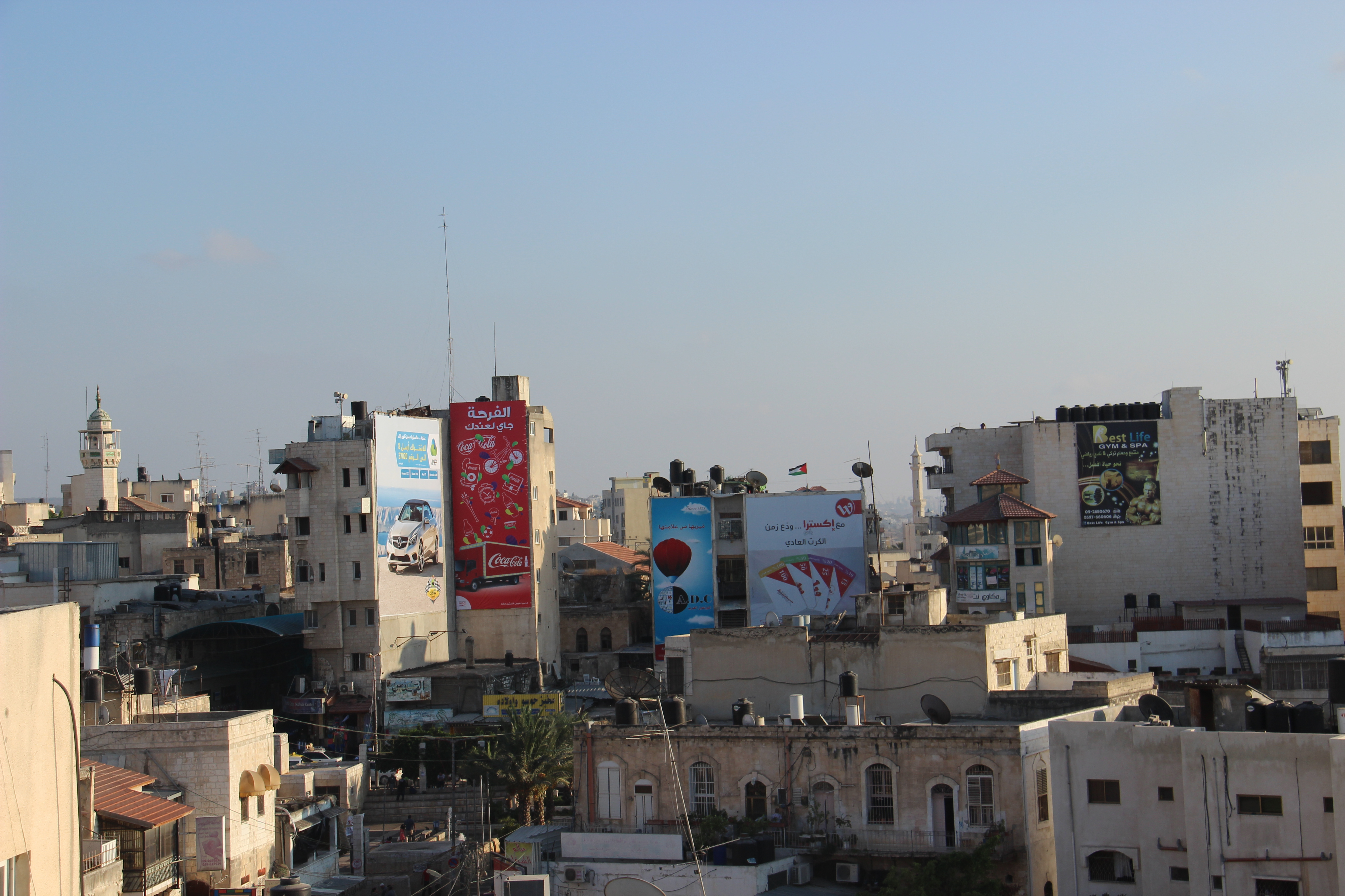 مدينة طولكرم.